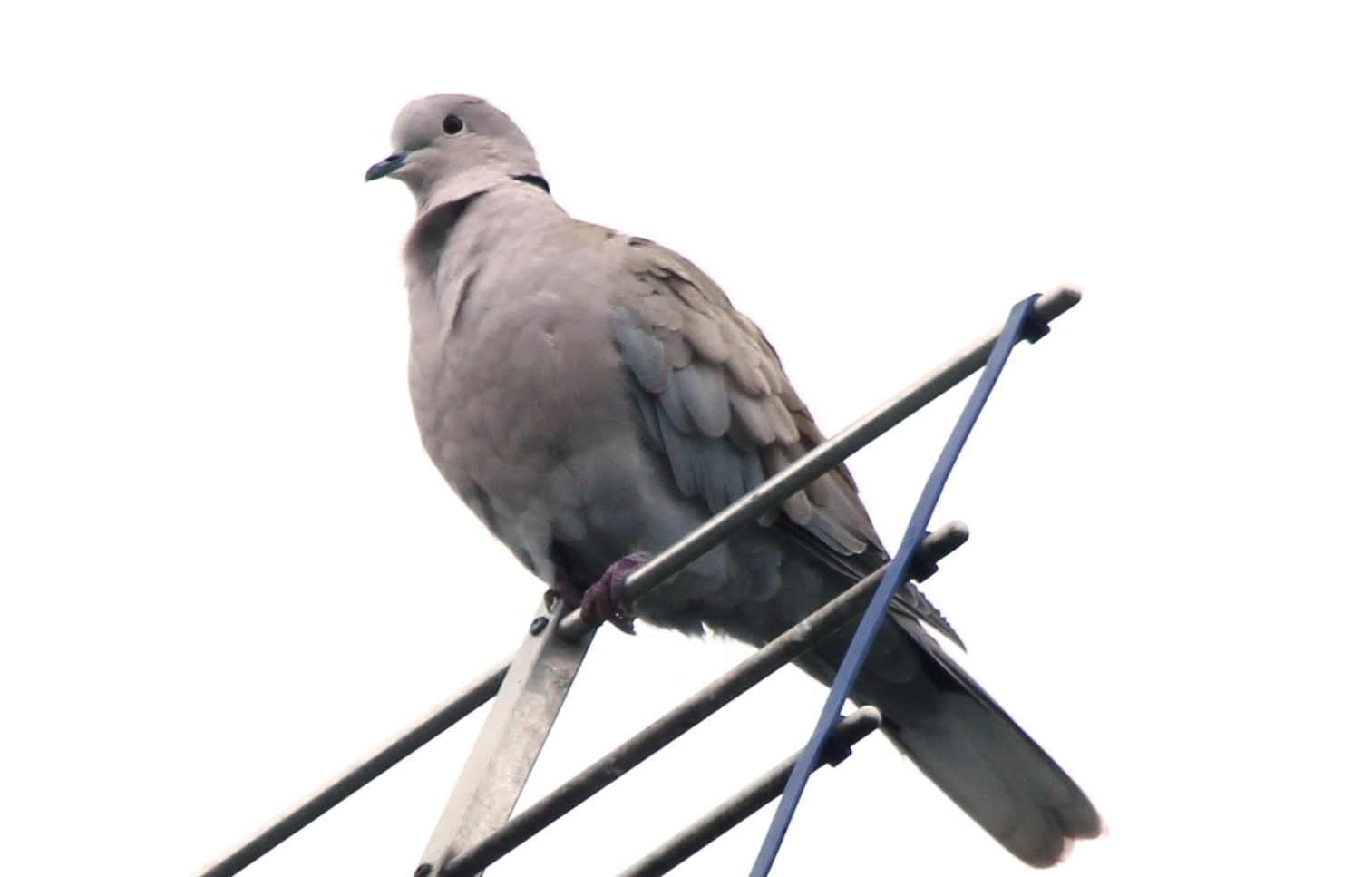 Turkinkyyhky (Streptopelia decaocto) istuu antennilla Salossa. Salossa on muutama yksilö Kirkkokadun päässä.